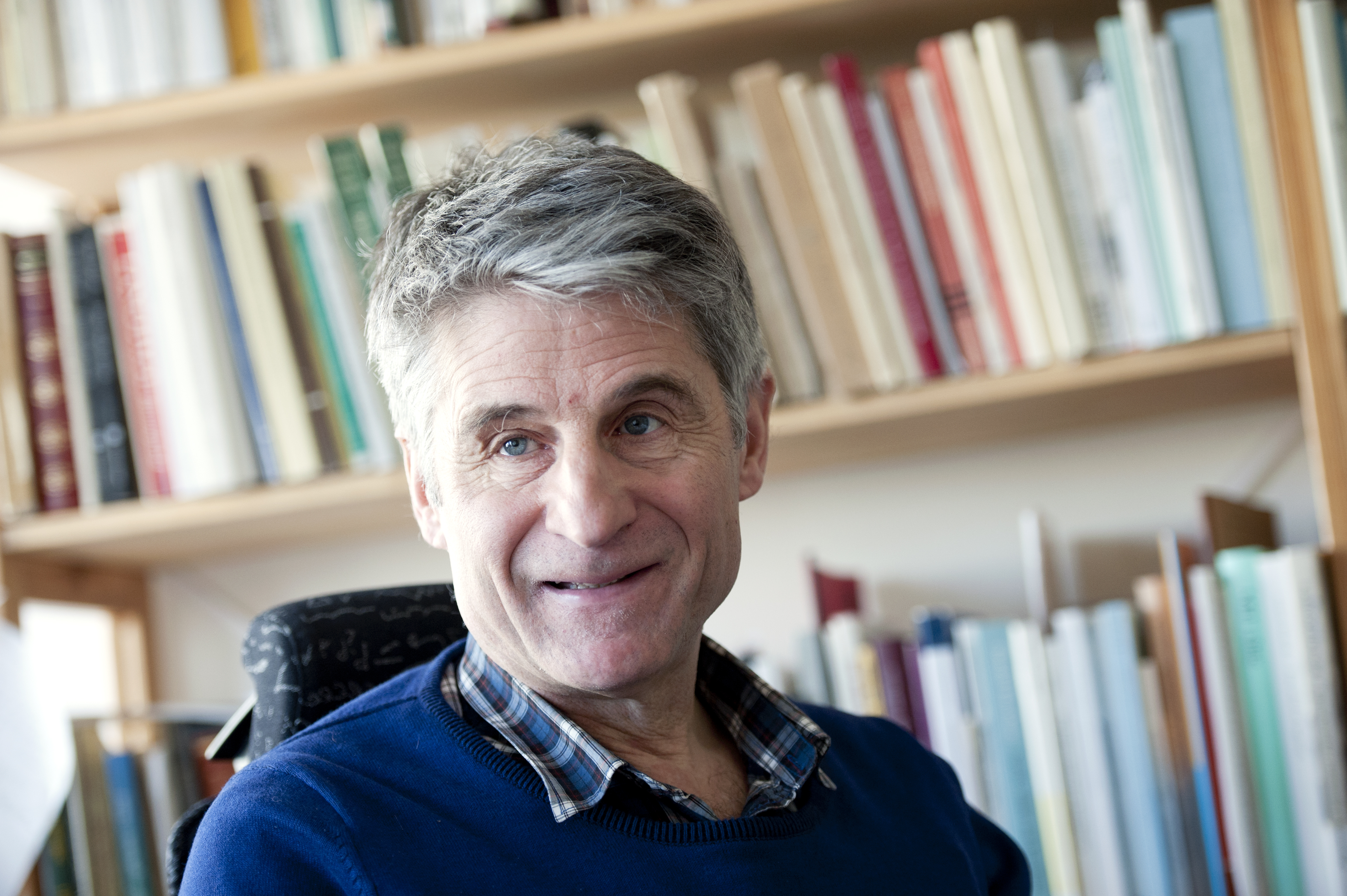 Olle Josephson, professor vid institutionen för nordiska språk vid Stockholms universitet.